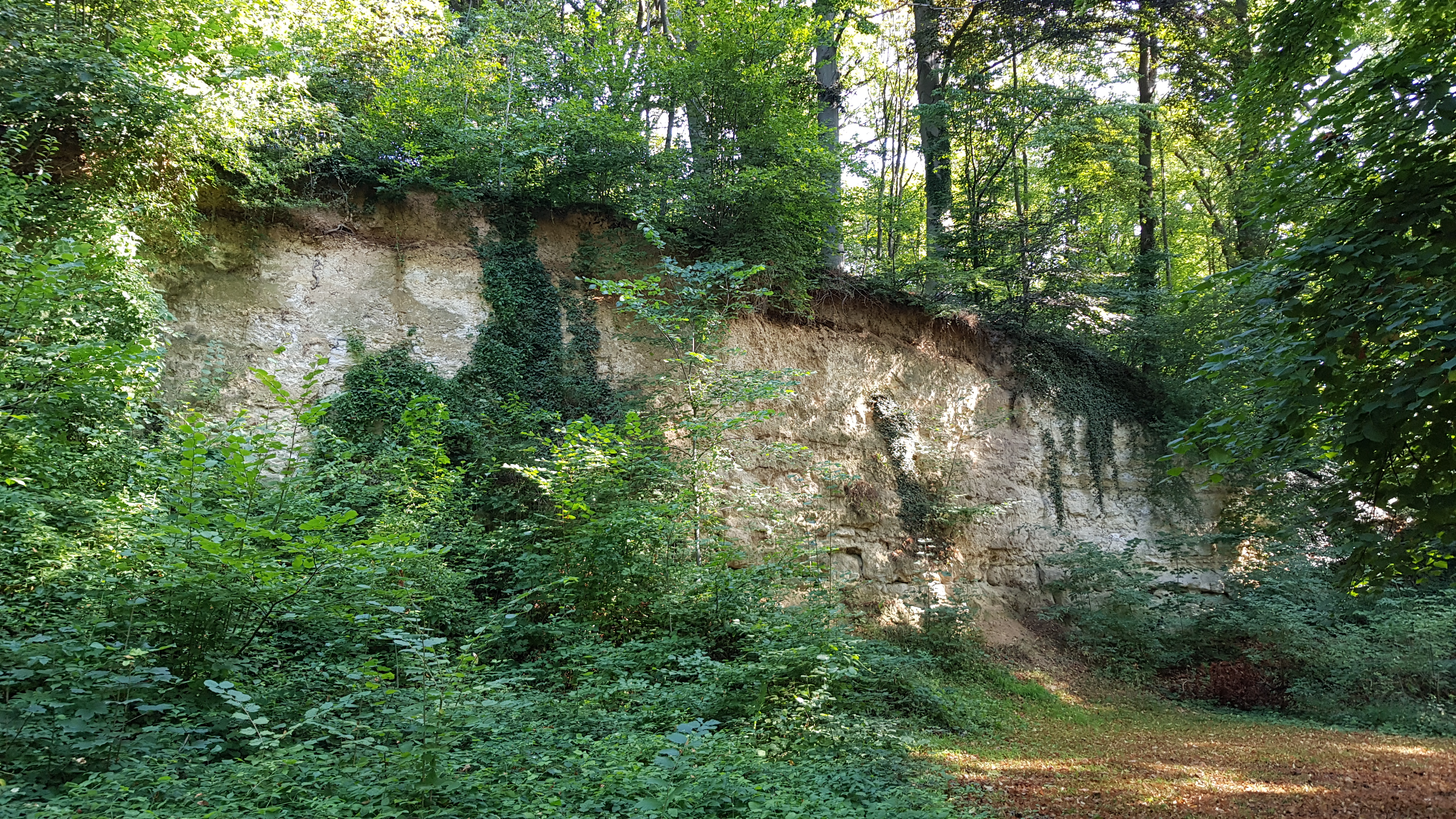 Groeve bij de Drie Beeldjes, Oud-Valkenburg, Valkenburg aan de Geul, Nederland